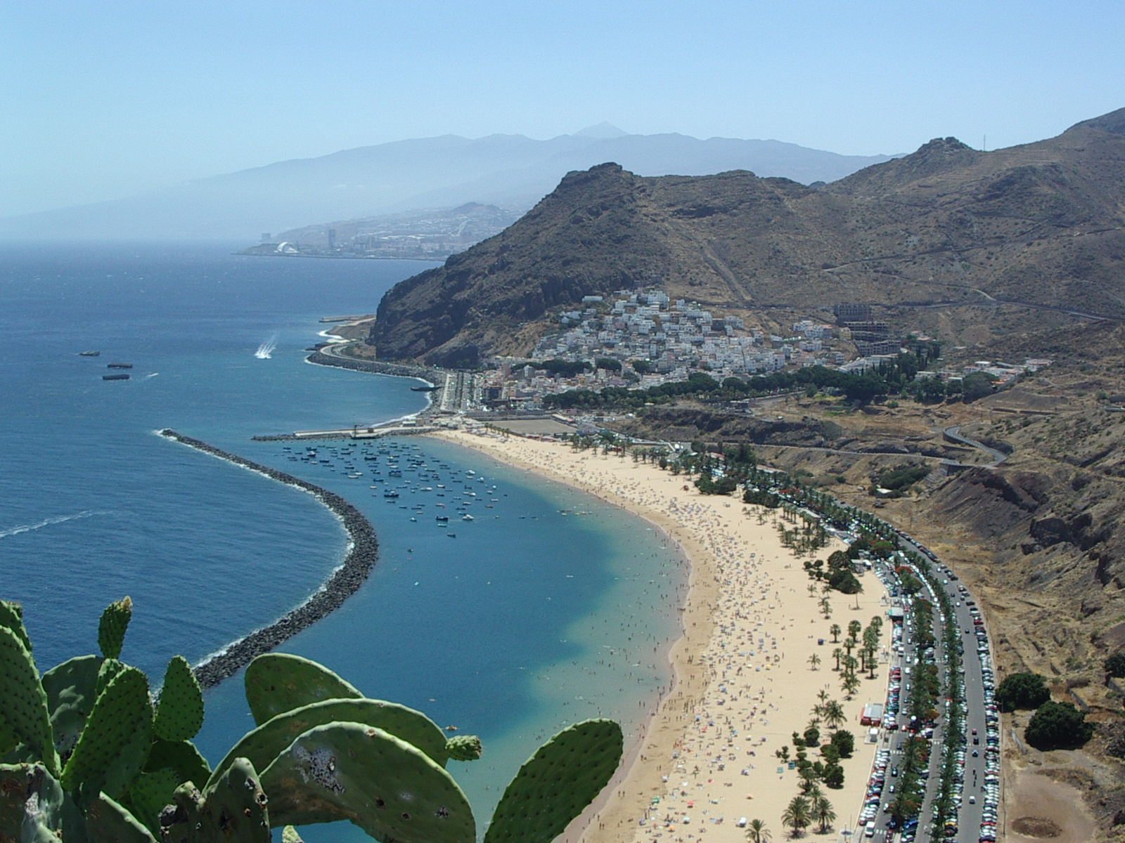 Playa de las Teresitas - Ténérife Source: photo perso Rémi Stosskopf